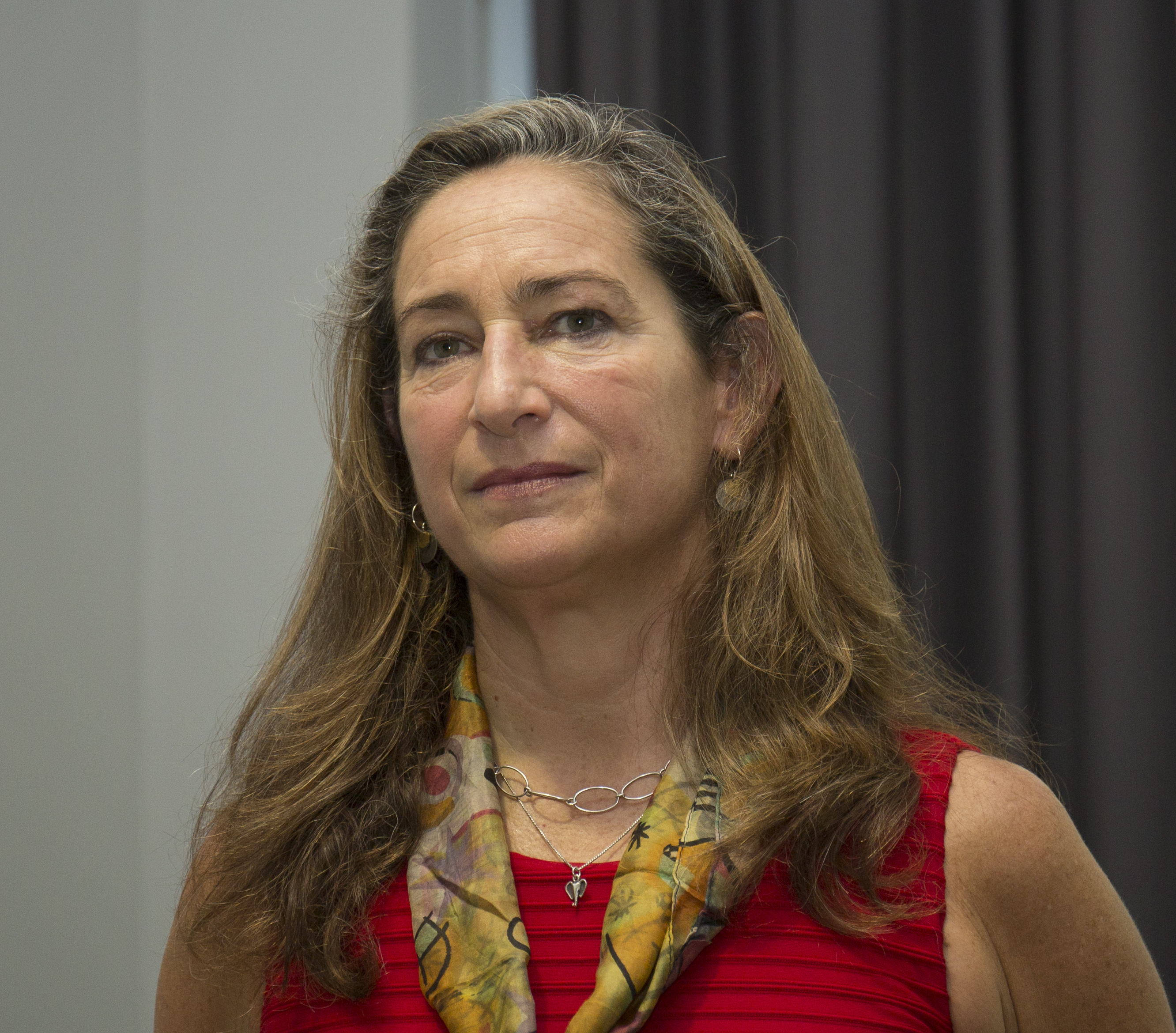 Caitlin O'Connell-Rodwell, zoologist and ecologist from the United States, speaking at the 2nd Symposium on Biotremology in Riva del Garda, Italy